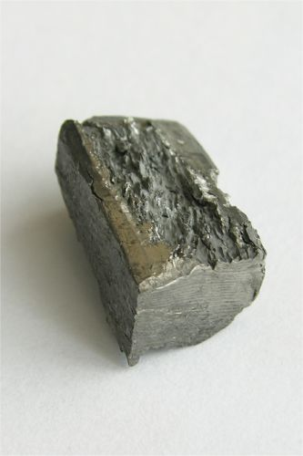 terbium Bildbeschreibung: Terbium Quelle: Foto aus meiner Elementesammlung Fotograf/Zeichner: Tomihahndorf Datum: April 2006